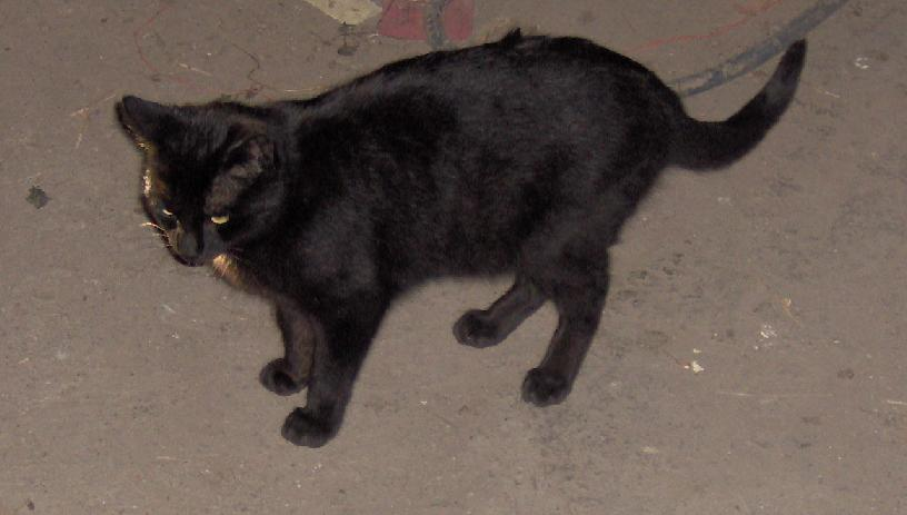 Gato europeo salvaje de color negro.